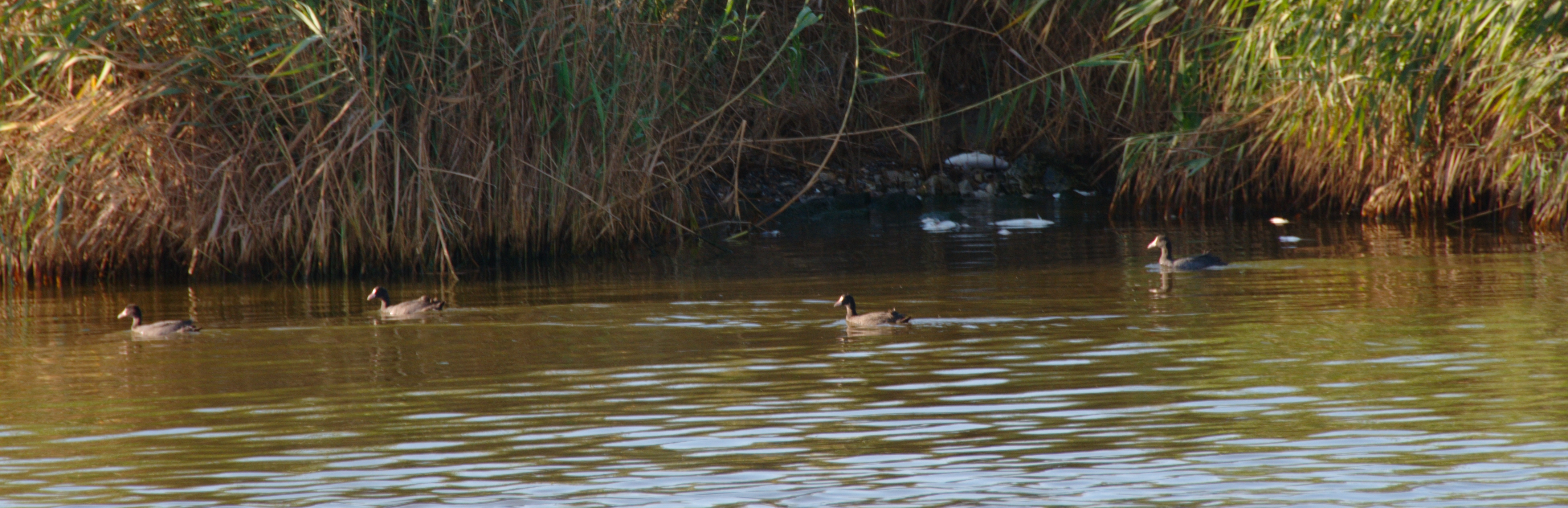 Poules d'eau au milieux de poissons mort sur l'oued Soummam probablement une pollution aux pesticides suite à des pluies importantes